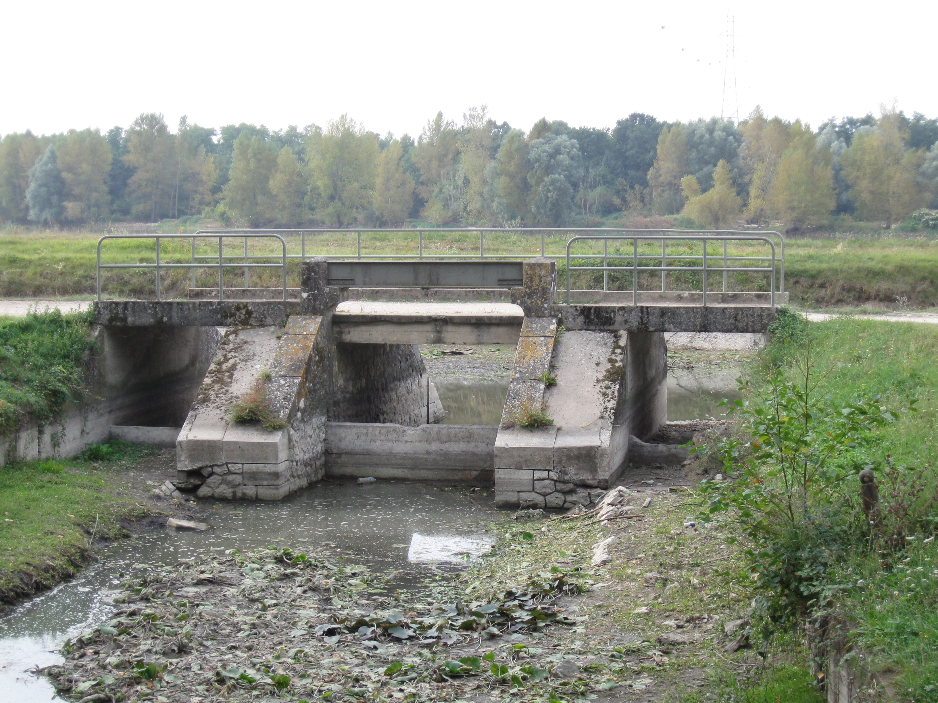 Le débouché de la Bionne dans le canal d'Orléans, Combleux, Loiret, France